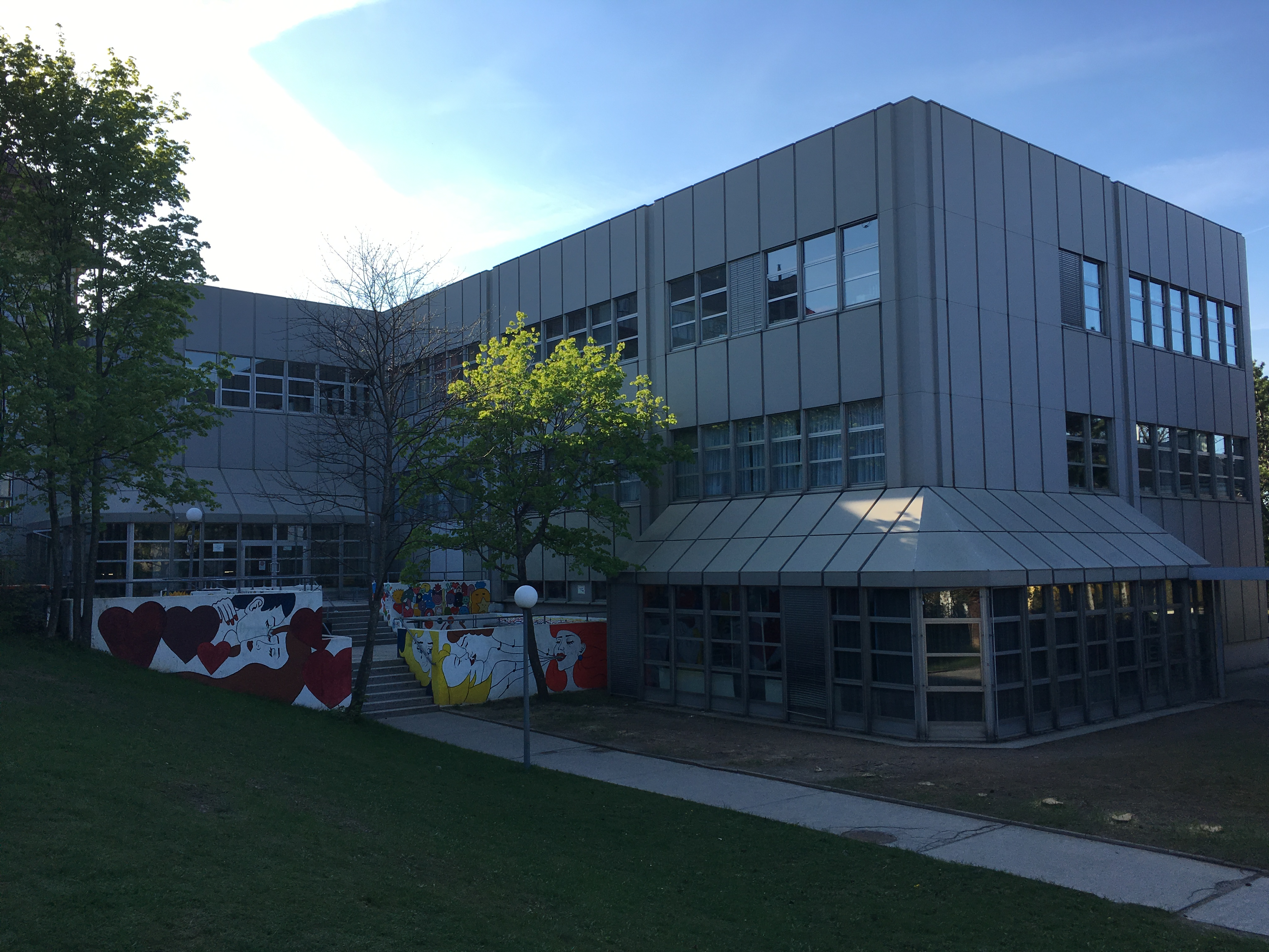 Die Schule von außen.